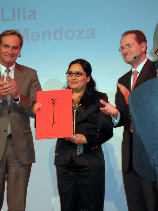 Ana Lilia Pérez während ihrer Auszeichnung mit dem Leipziger Medienpreis Preis für die Freiheit und Zukunft der Medien 2012.